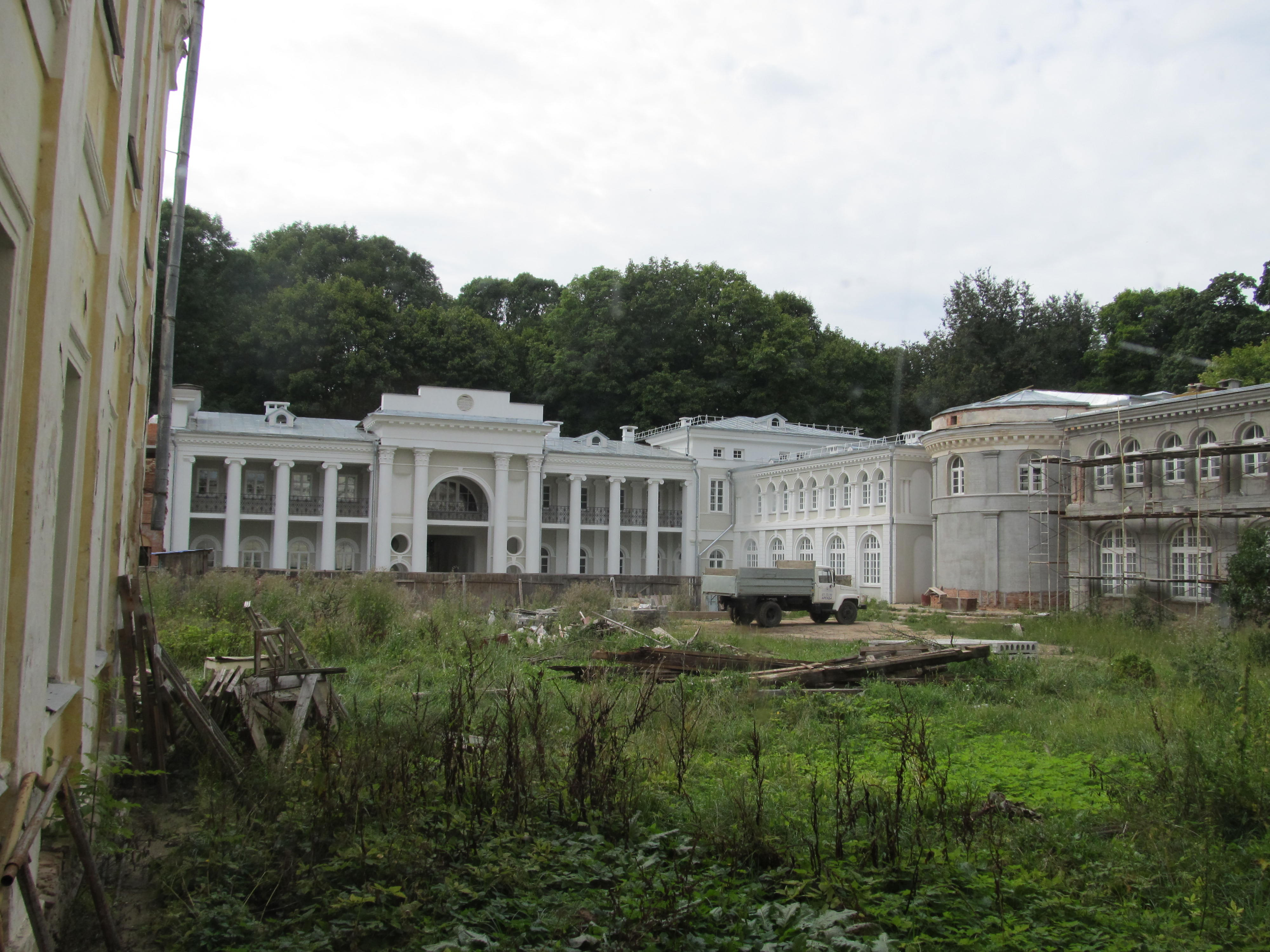 Беларуская (тарашкевіца): Палацава-паркавы ансамбль: палац з дэкаратыўным аздабленьнем інтэр’еру (ляпны дэкор, камін і печ, падлога з меандравым арнамантам, плафоны столі), гаспадарчыя пабудовы, парк. в. Жылічы This is a photo of Belarusian heritage monument. Reference number: 512Г000459 ( WLM)